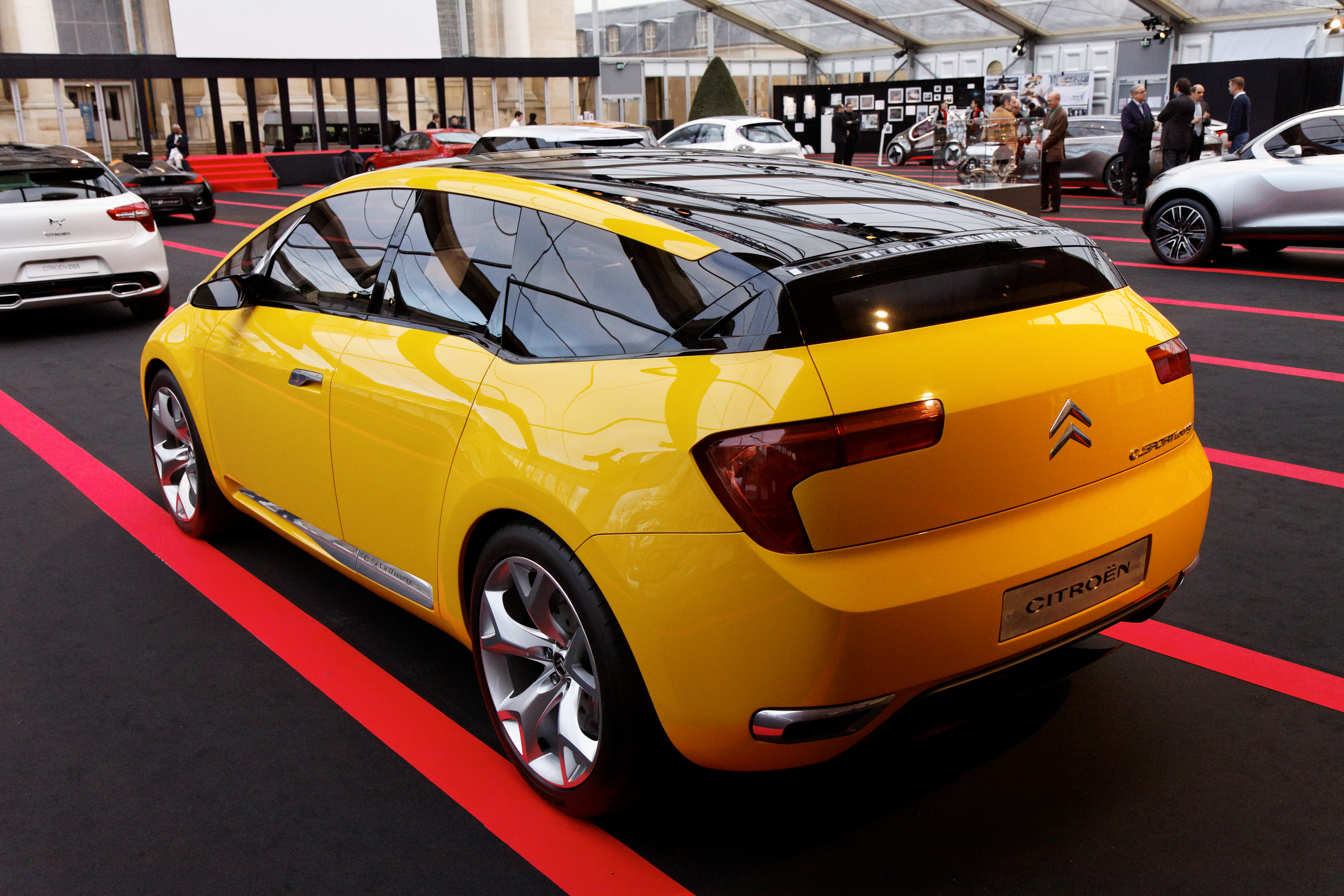 Citroën C-Sportlounge